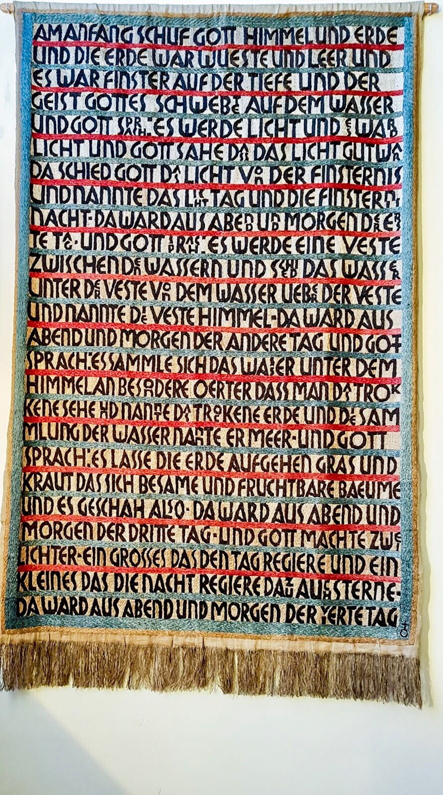 Schriftteppich von Rudolf Koch in der Friedenskirche Offenbach am Main